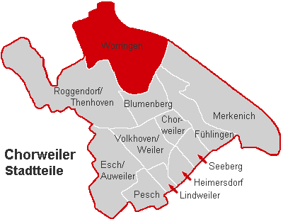 Lagekarte Worringen im Stadtbezirk Köln-Chorweiler